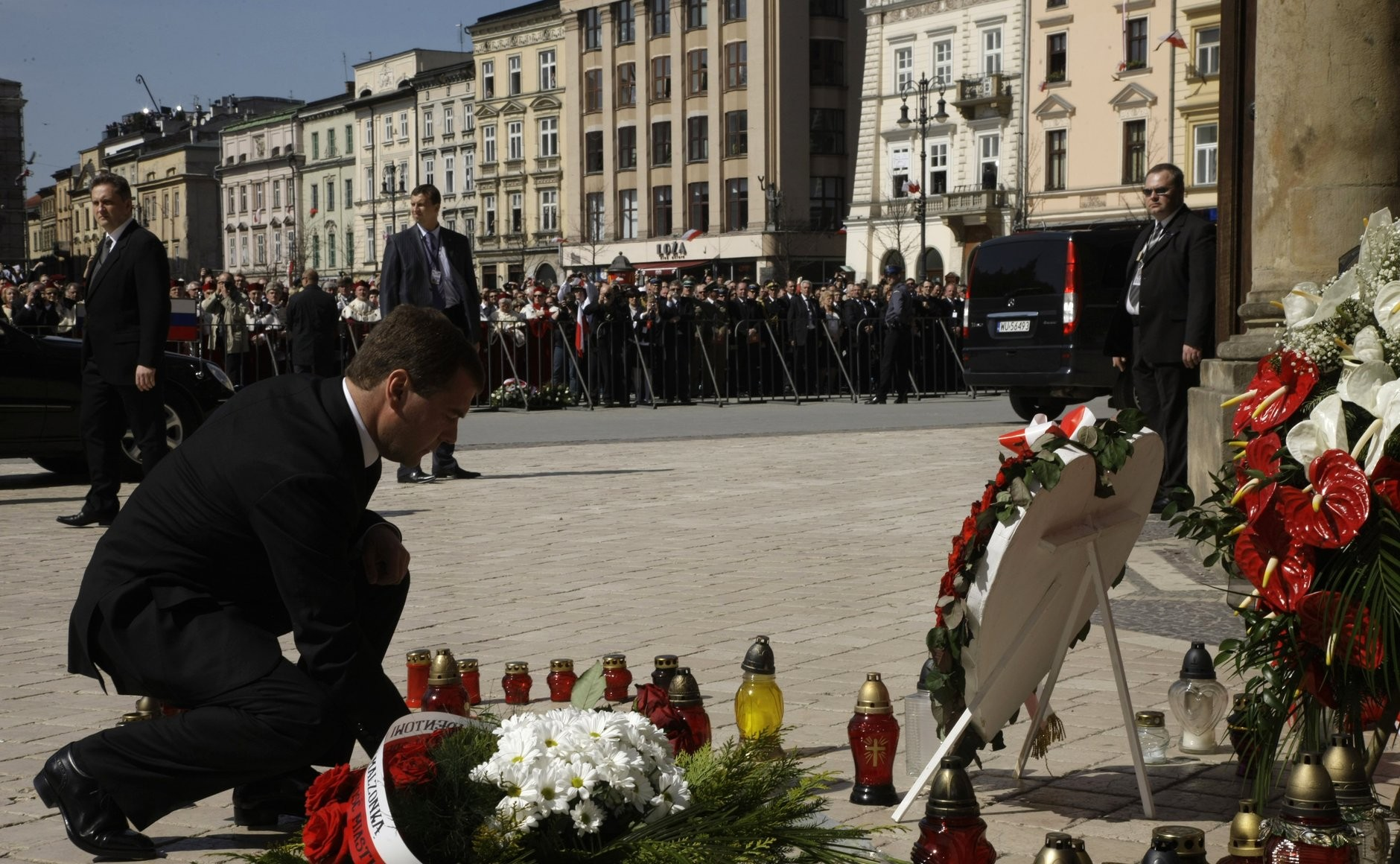 Дмитрий Медведев возложил цветы к портретам Леха и Марии Качиньских.